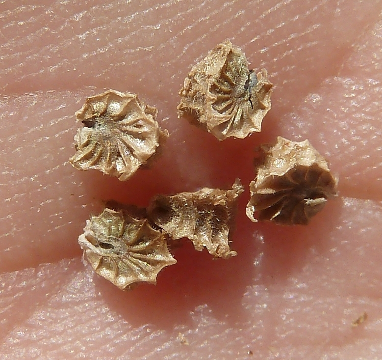 Malva parviflora (Malva, malva de flor chica): Mericarpos del fruto (esquizocarpo) sueltos - Descampado c./San Antonio con Compositor Manuel Berná García, Albatera (Alicante, España).